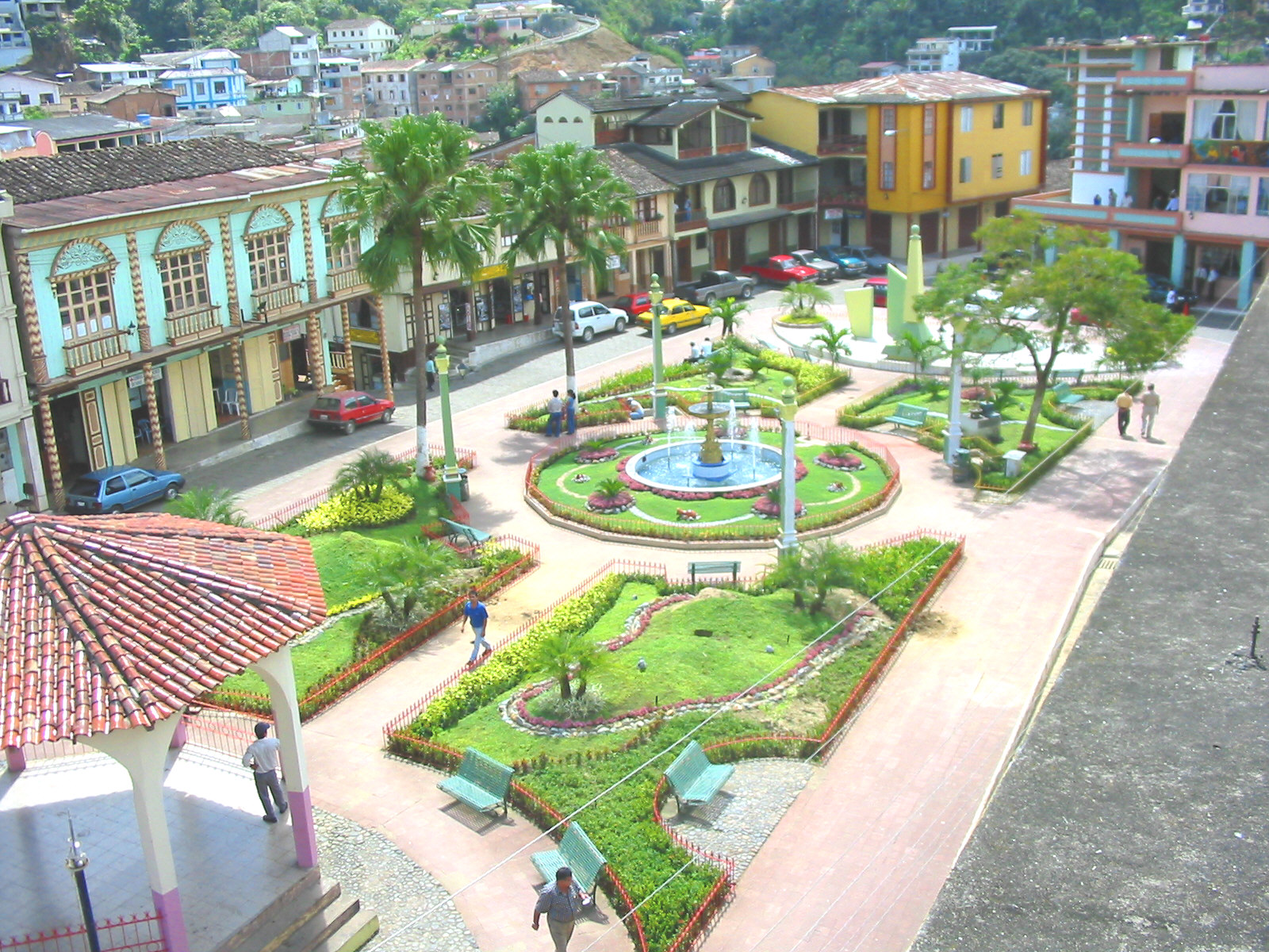 Parque de Zaruma